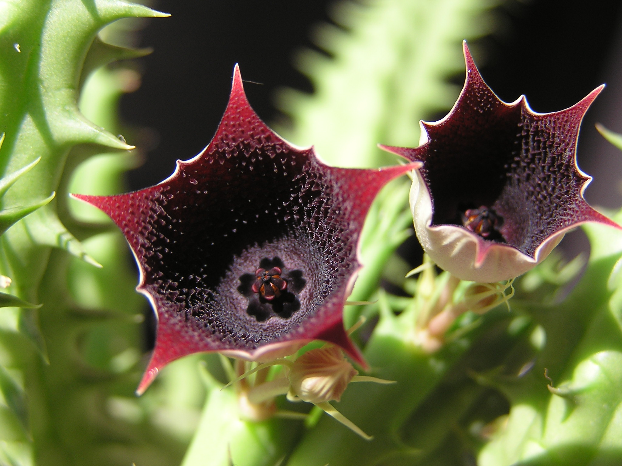 Комнатное растение из рода Huernia